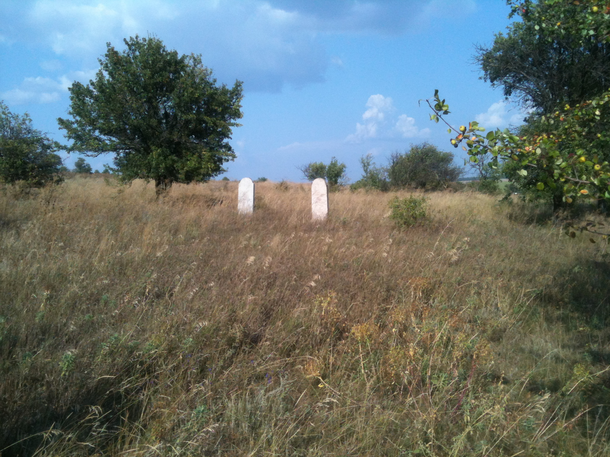 Село Долинське (Запорізький район), 2013 рік. Кладовище менонітів.